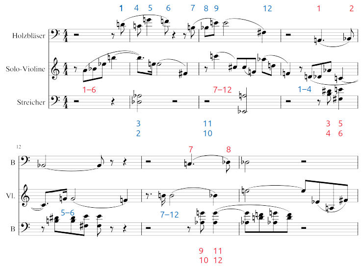 Arnold Schönberg: Concerto for Violin op. 36 (simplified). Row structure